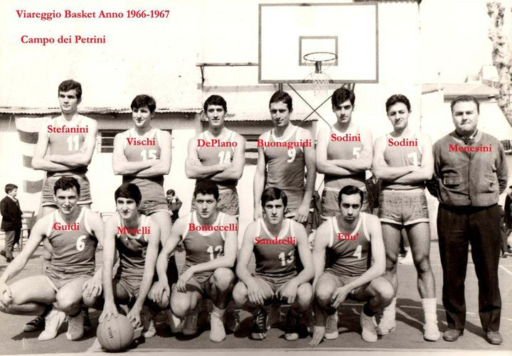 Labor 1967-68